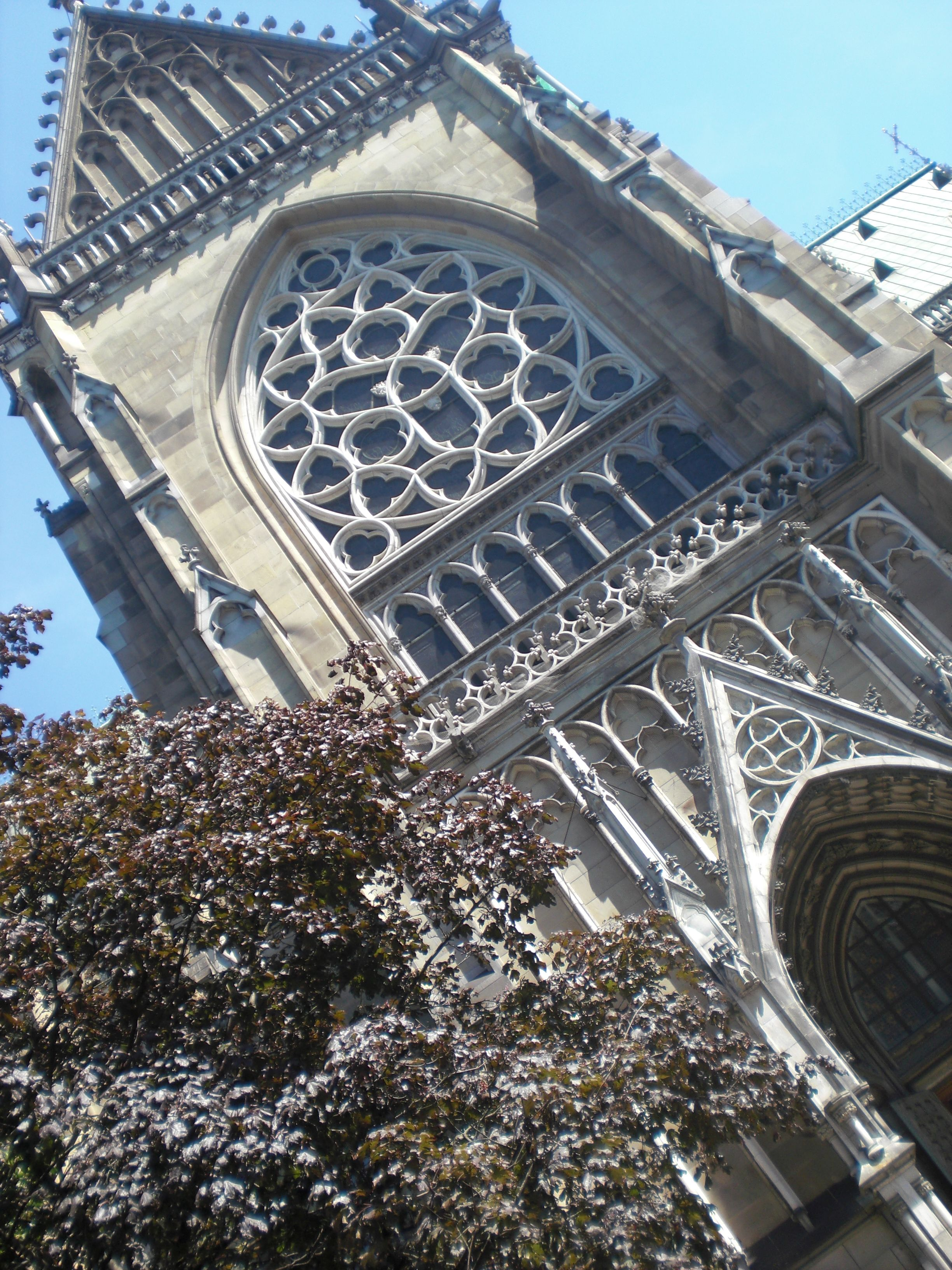 Neuer Dom Linz